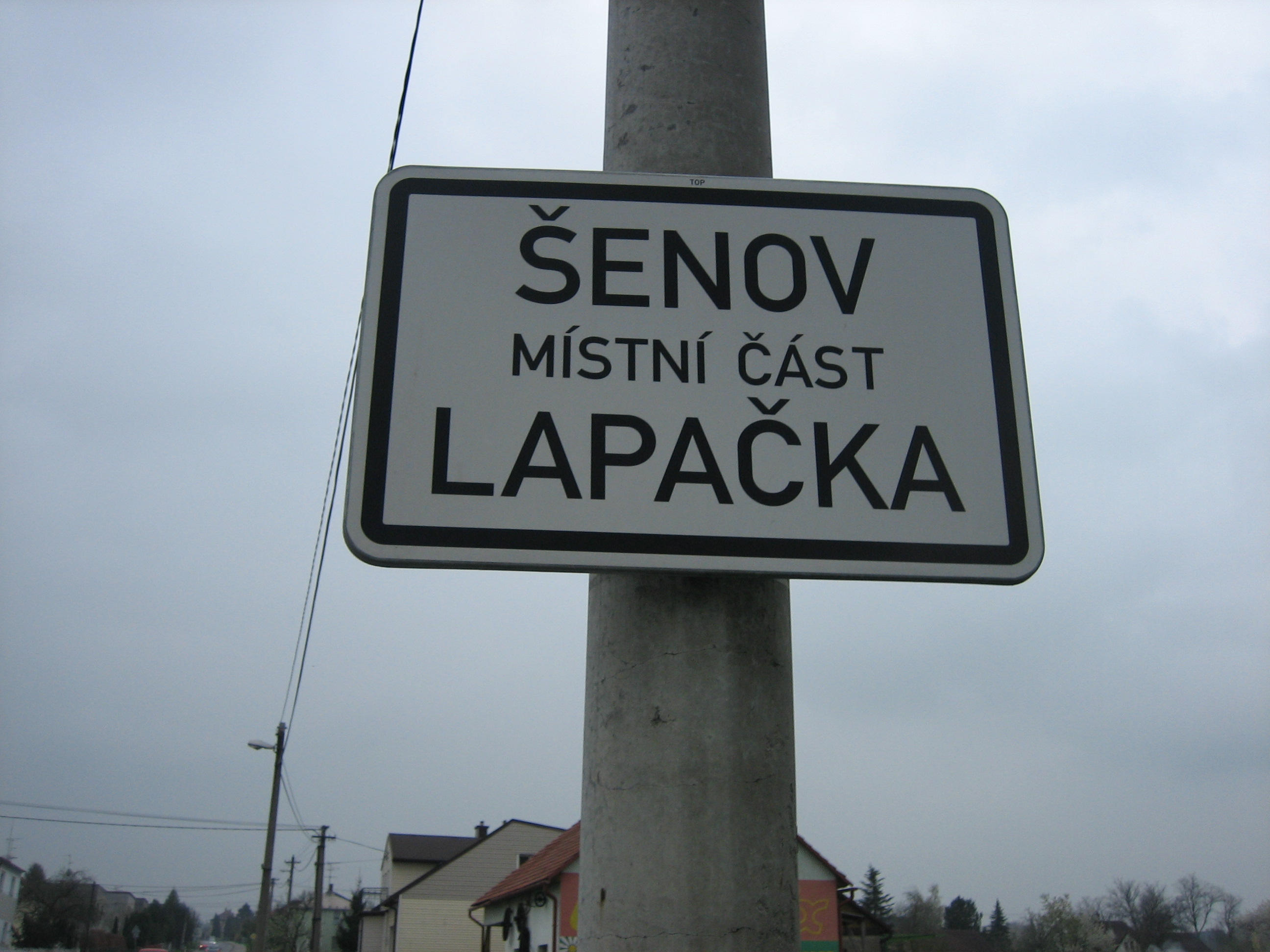 Dopravní značka uvozující začátek místní části Lapačka v Šenově.